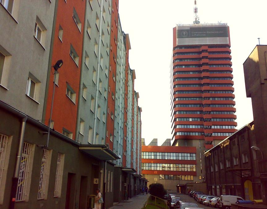 Collegium Altum w Poznaniu. Uniwersytet Ekonomiczny.